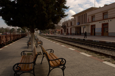 Manisa train station, Turkey